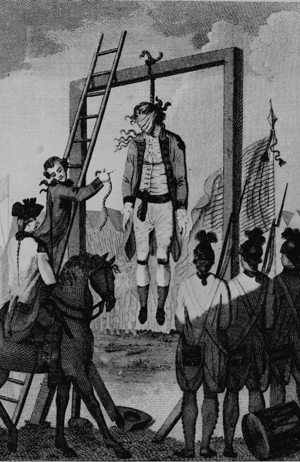 John André hanged